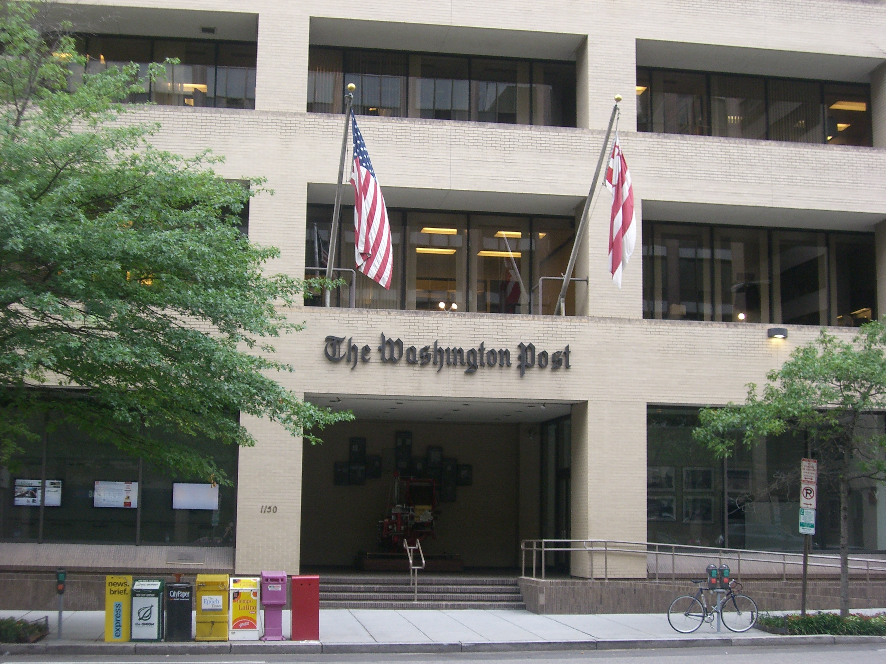 Redaktion der Washington Post, Washington D.C.